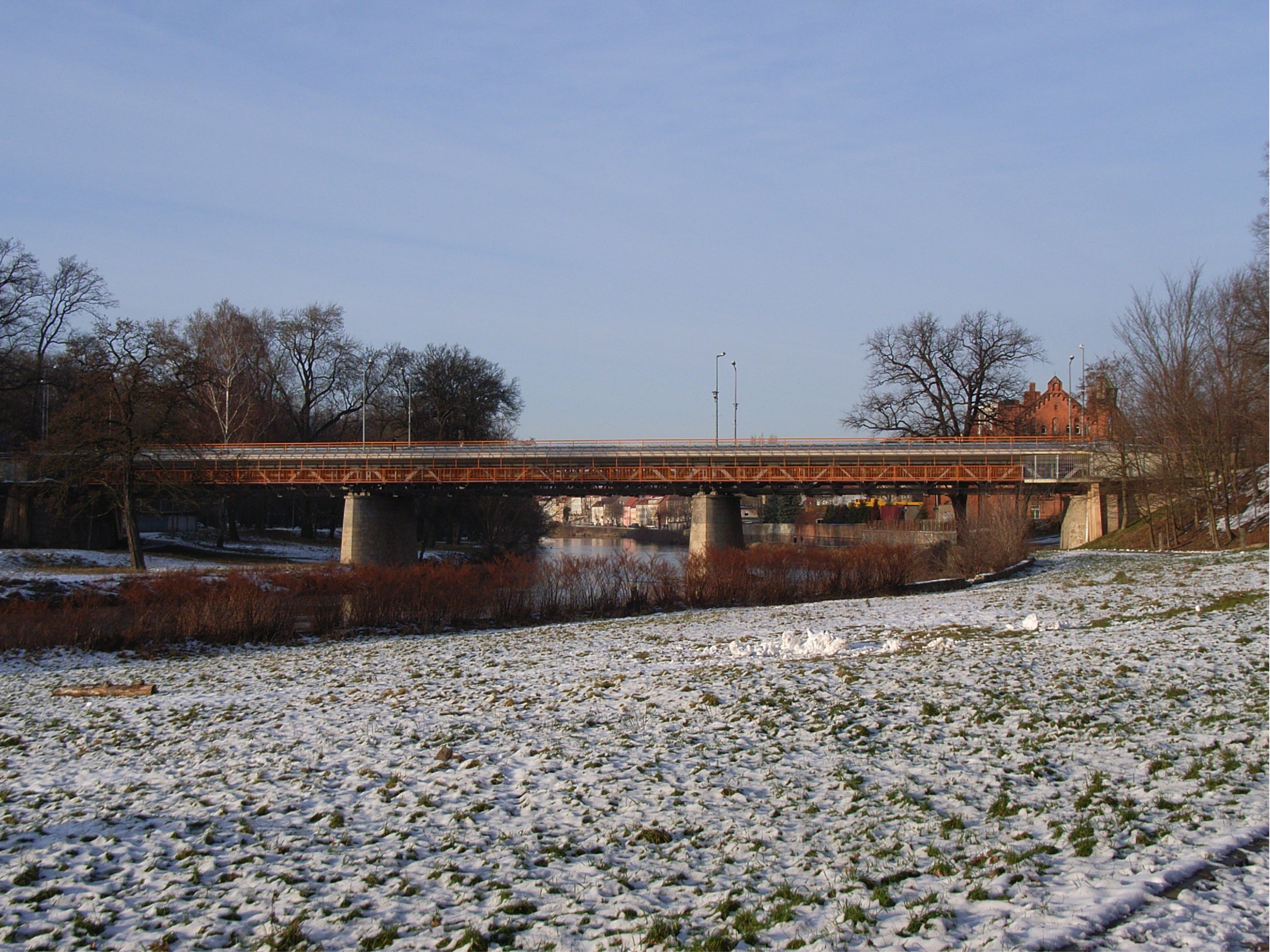 Die Stadtbrücke (Johannes-Paul-II.-Brücke) in Görlitz/Zgorzelec